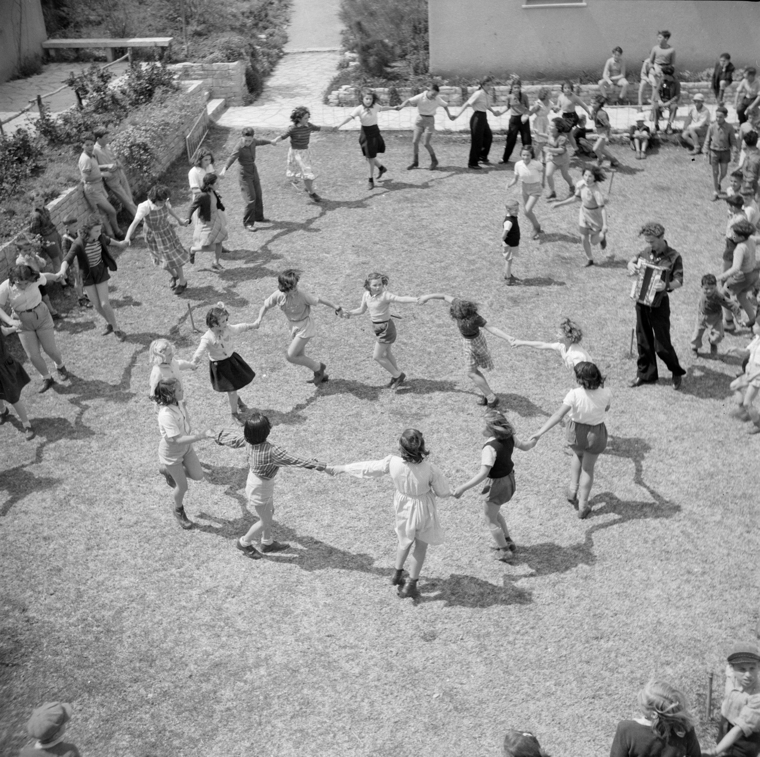 Collectie / Archief : Fotocollectie Van de Poll Reportage / Serie : Israël 1948-1949: kinderdorp Oniem Beschrijving : Kinderen van het kinderdorp Oniem dansen (vermoedelijk) de hora Datum : 1948 Locatie : Israël Trefwoorden : jeugdzorg, kinderdorpen, kinderen, volksdansen Fotograaf : Poll, Willem van de, [onbekend] Auteursrechthebbende : Nationaal Archief Materiaalsoort : Negatief (zwart/wit) Nummer archiefinventaris : bekijk toegang 2.24.14.02 Bestanddeelnummer : 255-0545